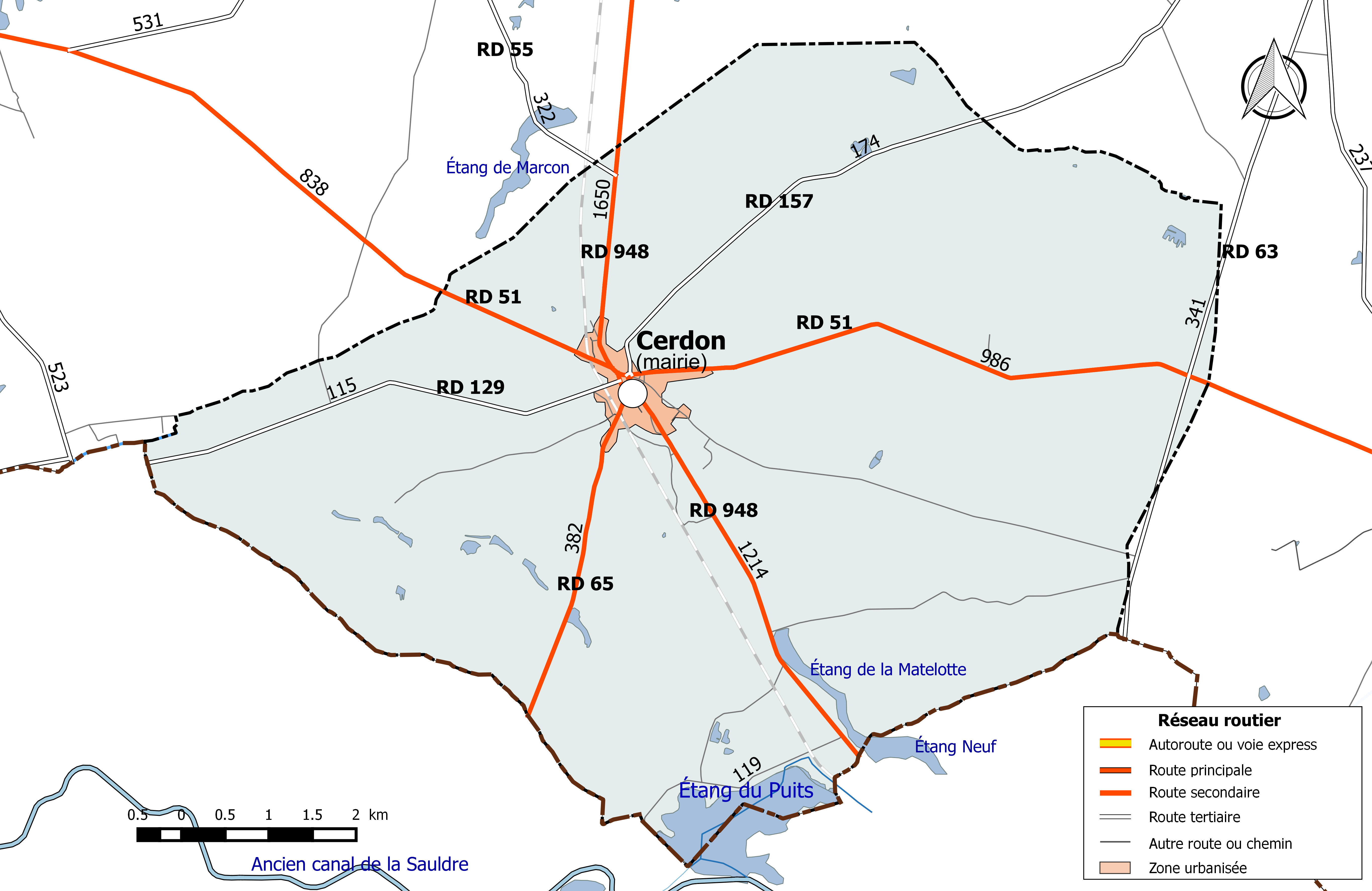 Carte du réseau routier de la commune de Cerdon (Loiret).